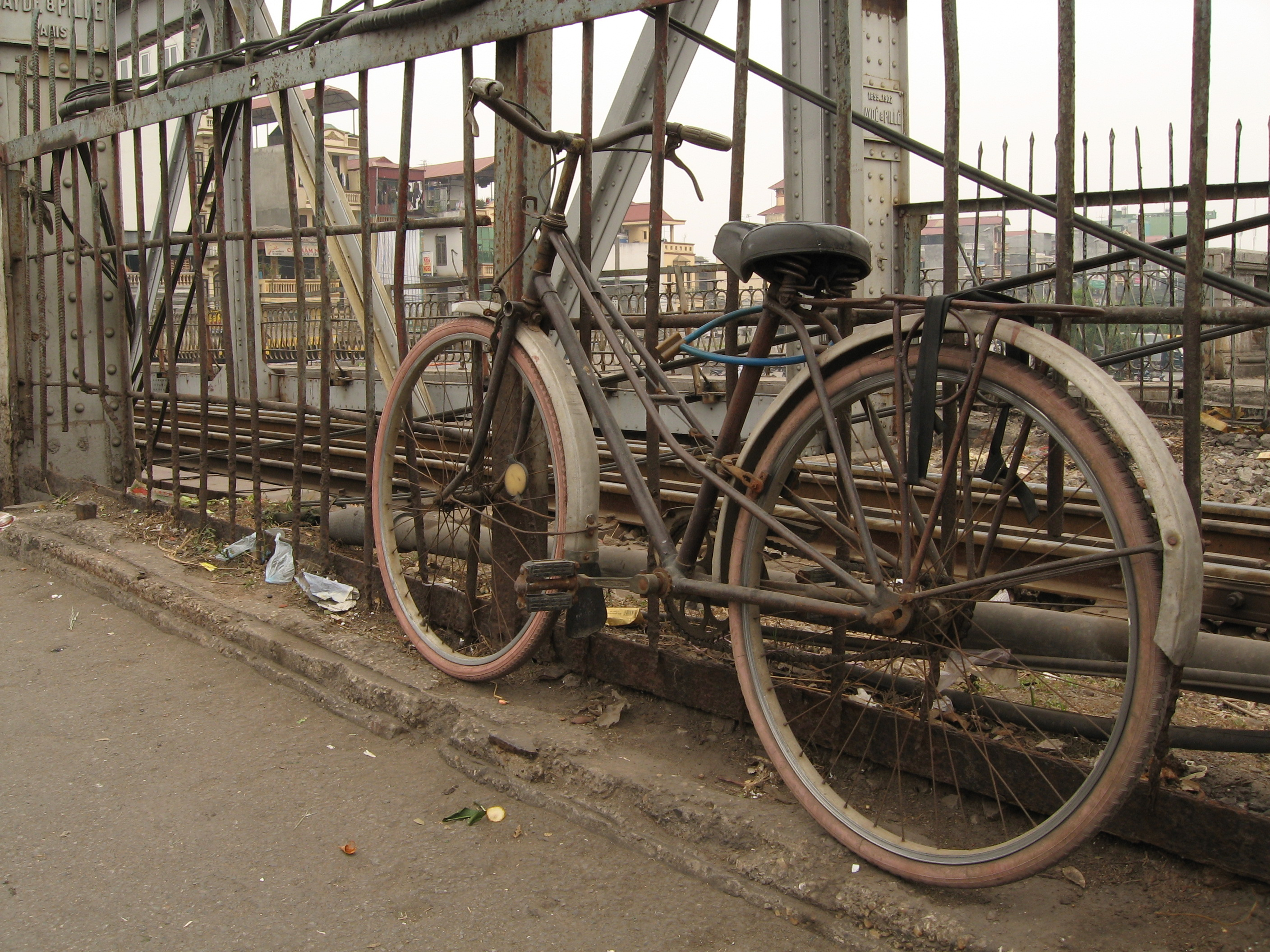 Hanoi, Vietnam